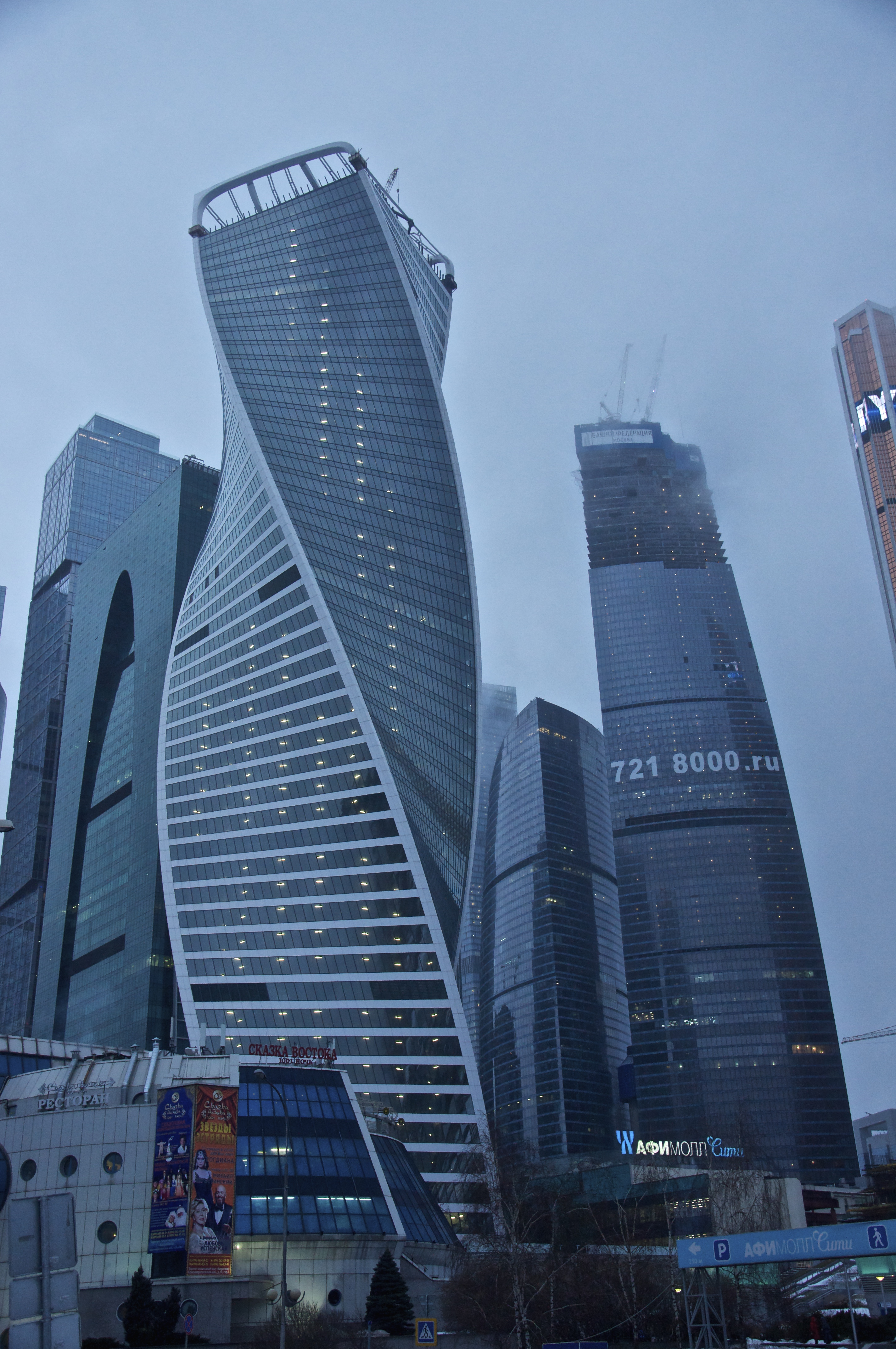 Идёт обрамление крыши